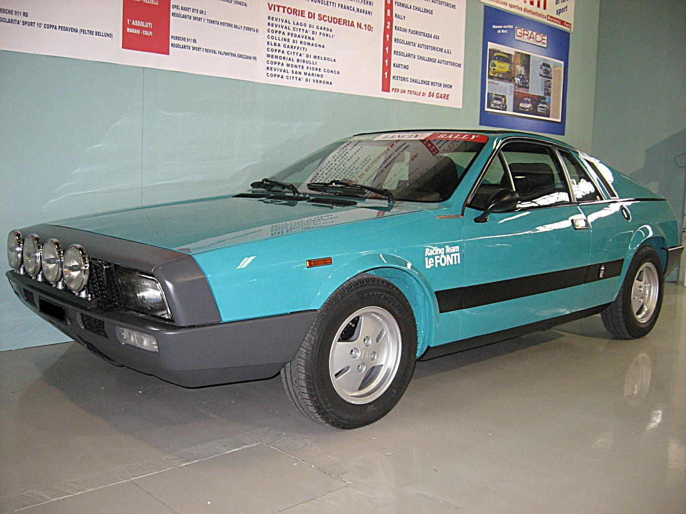 Subject:Lancia Beta Montecarlo